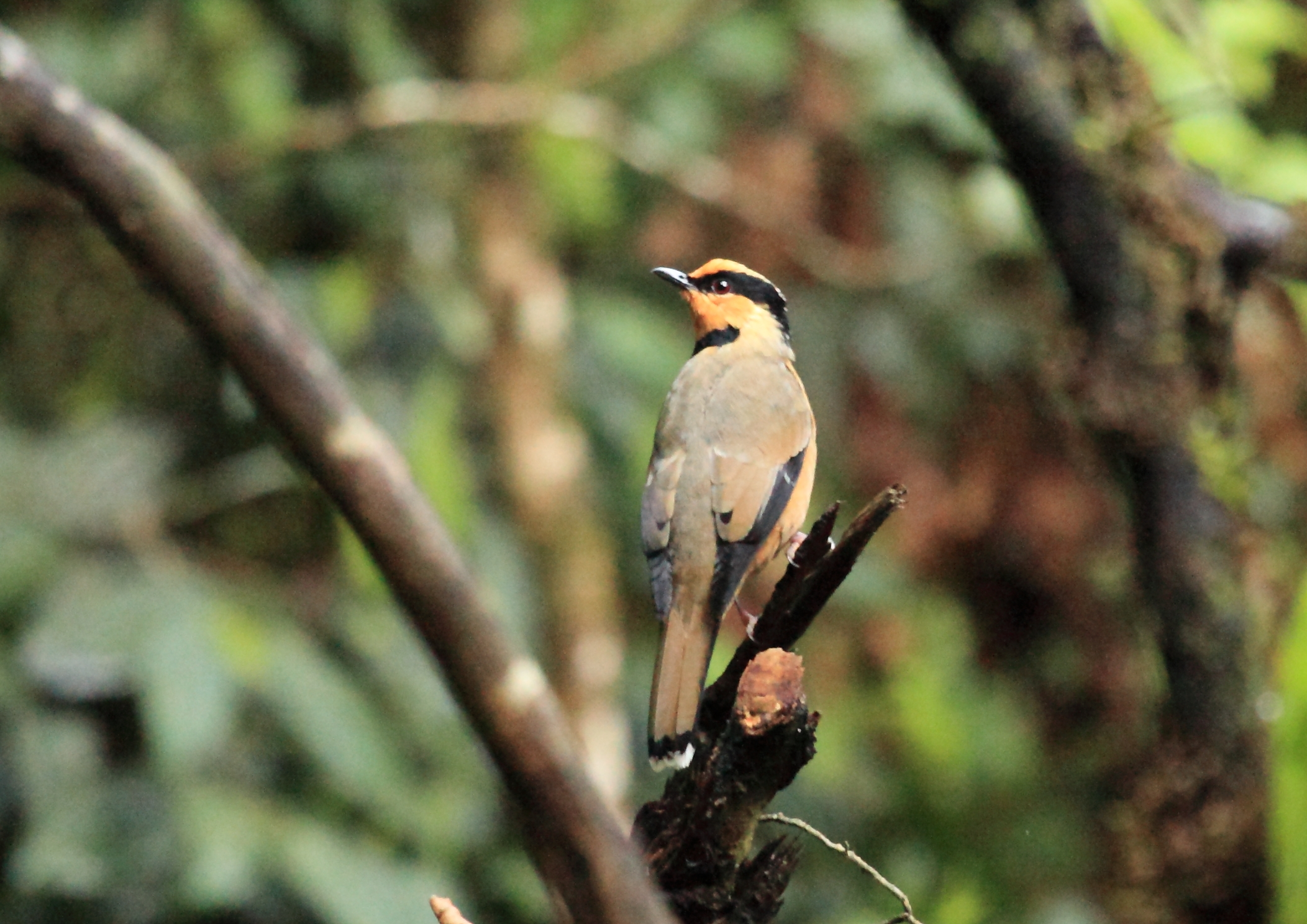 Fruit-Hunter, Mount Kinabalu, Borneo